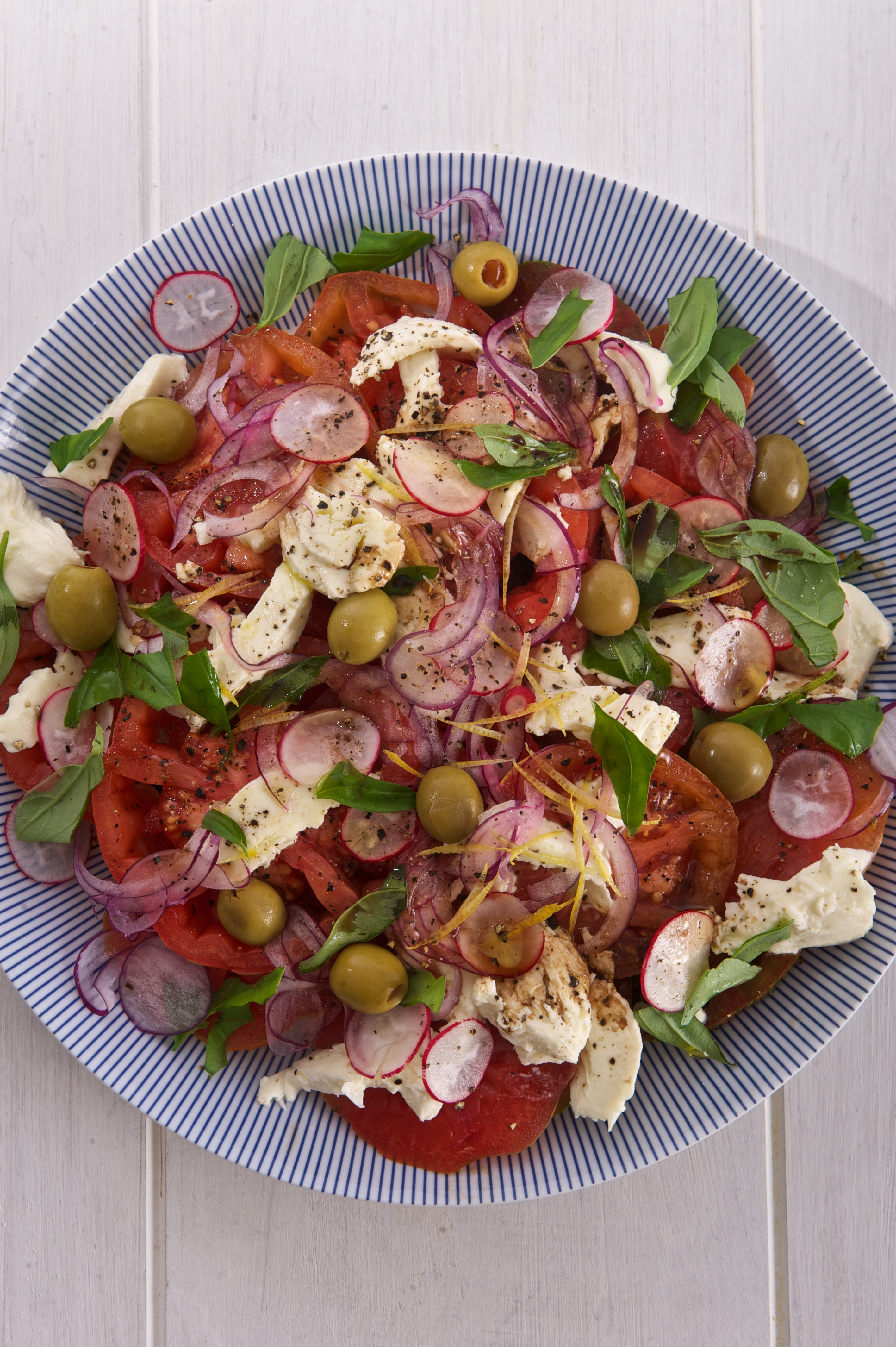 Heritage Tomato Mozzarella Salad